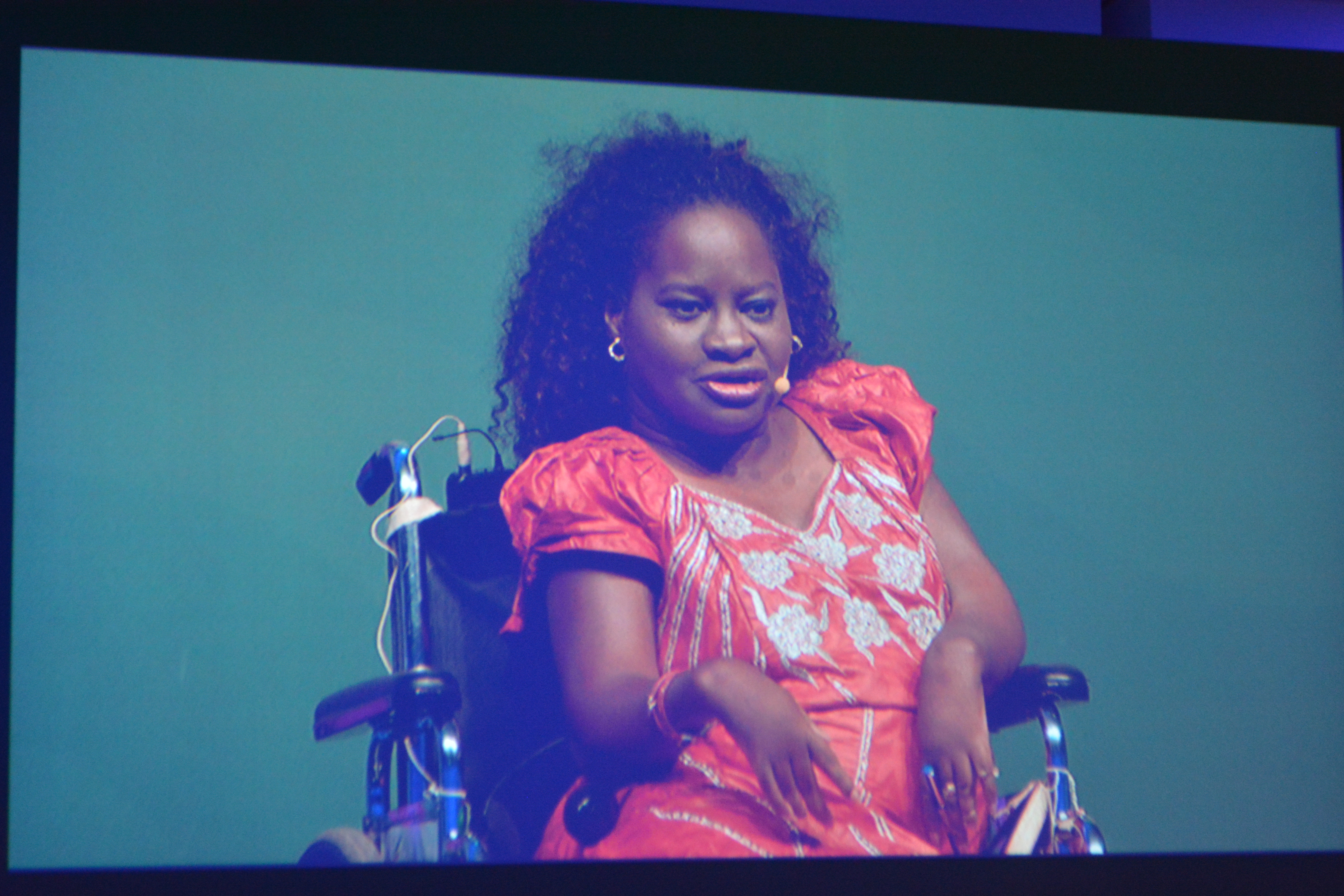 Feminista en AWID 2016